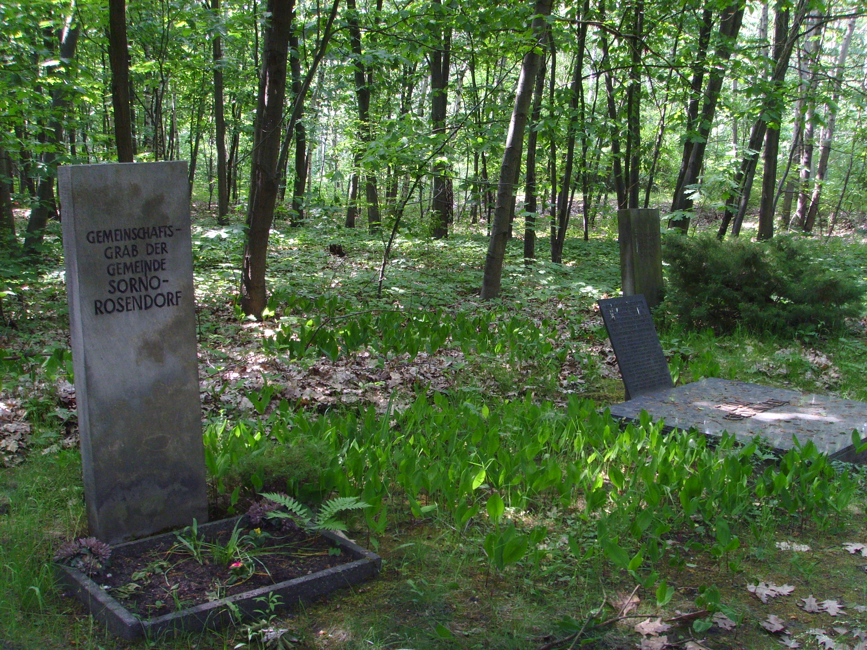 Waldfriedhof in Senftenberg, Gedenkgrabsteine und -grabstätten für die devastierten Friedhöfe der Orte Sorno-Rosendorf, Sauo und Rauno, die für den Braunkohleabau abgebaggert wurden